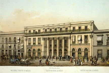 Vista del Gran Teatro Nacional de México en un grabado del siglo XIX